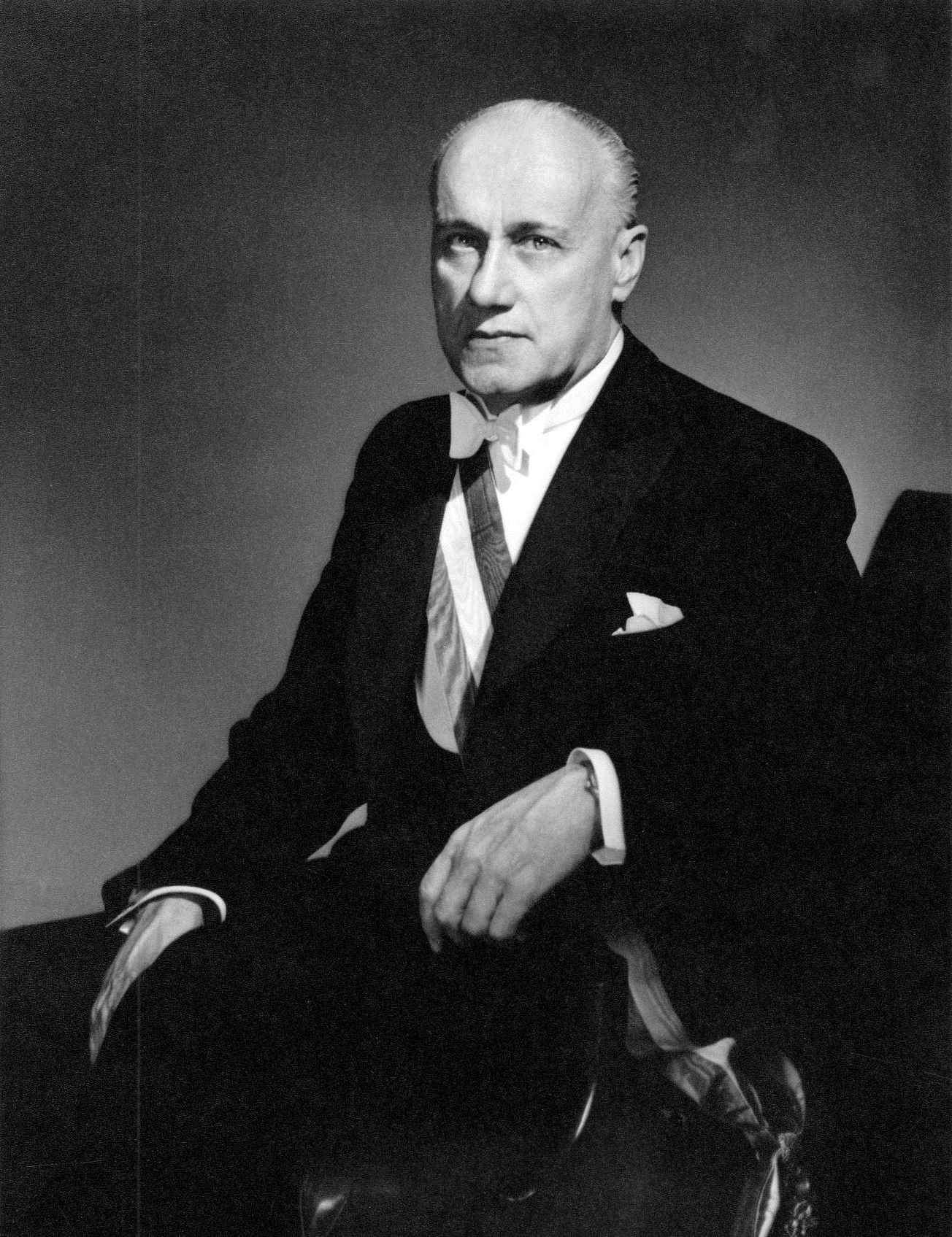 Jorge Alessandri (Santiago, 19 de mayo de 1896 – Santiago, 31 de agosto de 1986). Ingeniero, dirigente empresarial y político. Presidió la Nación entre 1958 a 1964. Senador entre 1957 a 1965 y diputado, entre 1926 a 1930. Fue ministro de Estado. Ministro de Hacienda durante la presidencia de Gabriel González Videla.